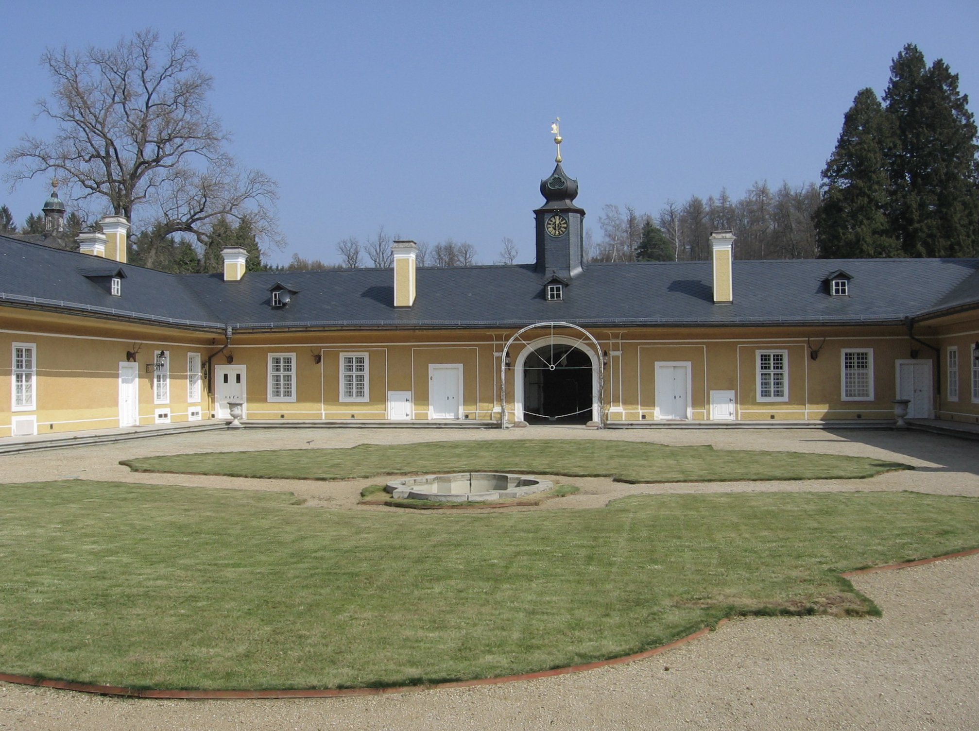 Vnitřní nádvoří zámku Kozel